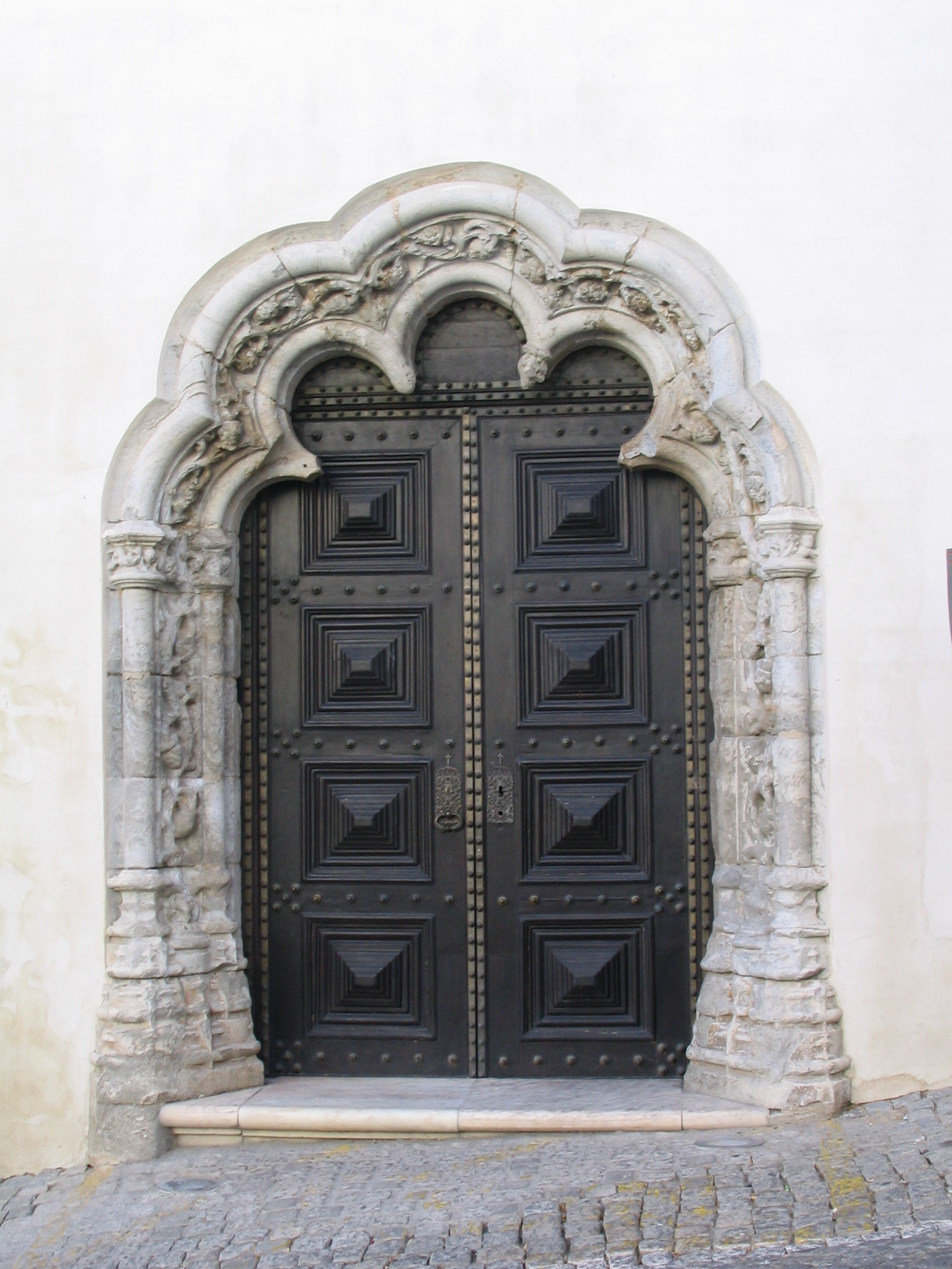 Porta d'església. Elvas. Portugal